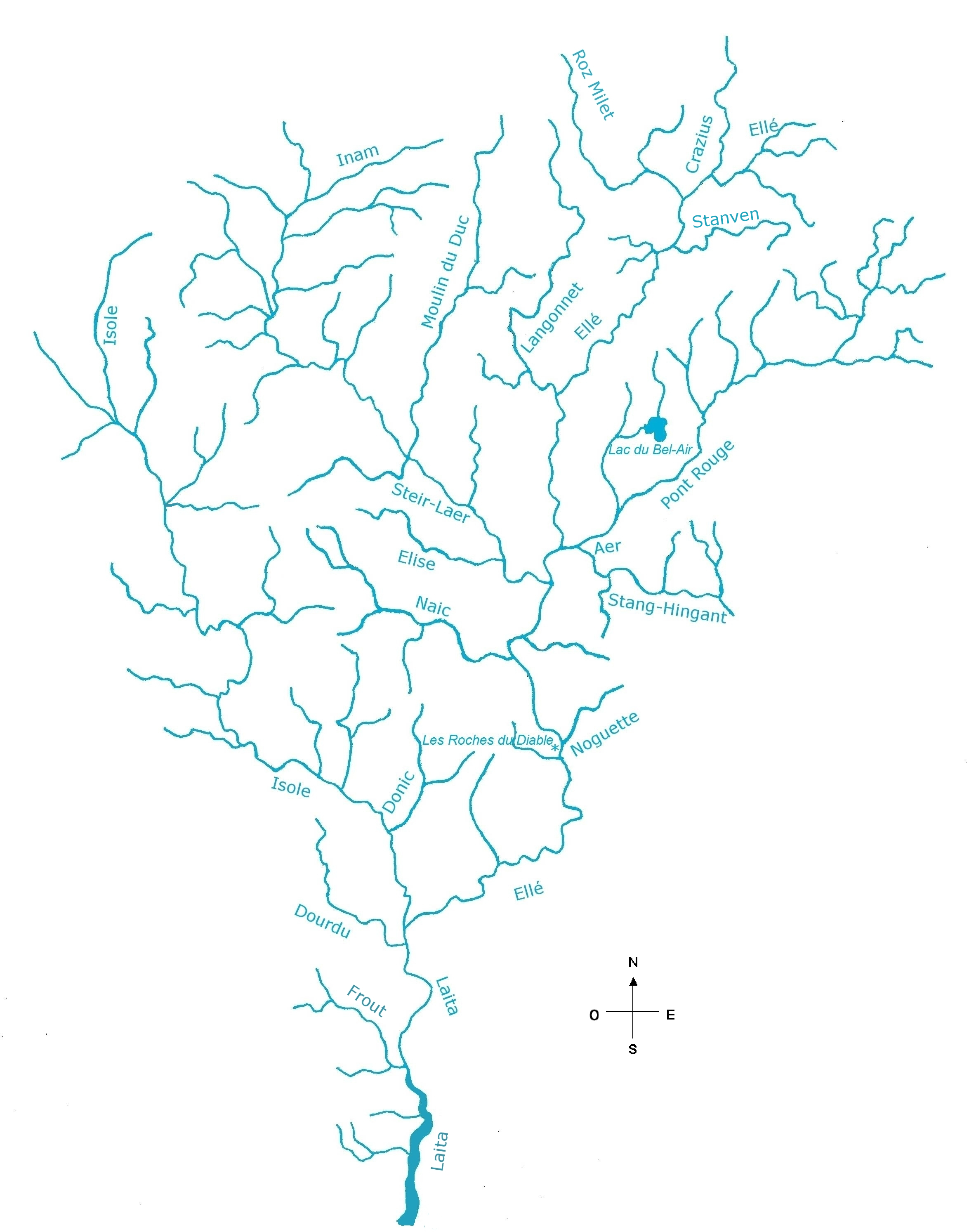 carte hydrographique de la Laïta et de ses affluents.